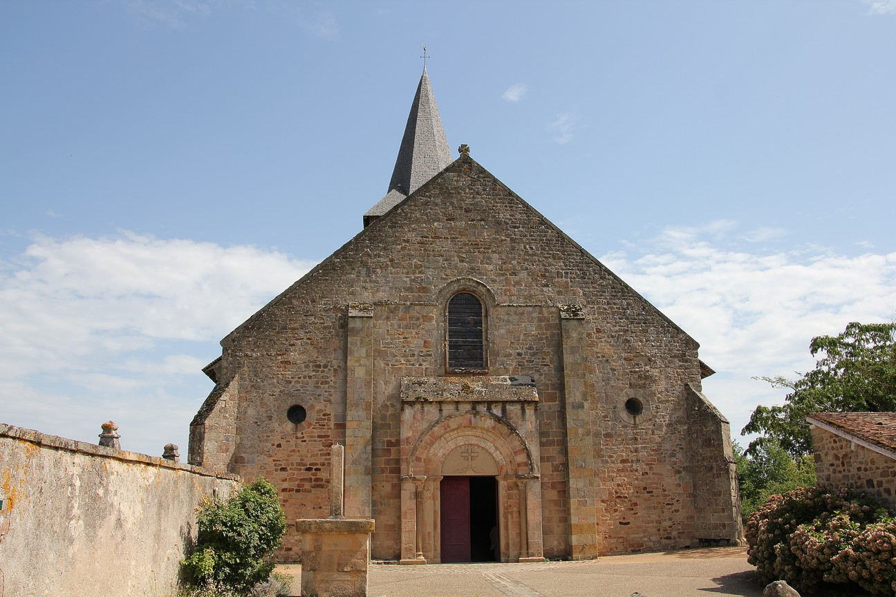 Eglise St Etienne de Franchesse - portail ouest